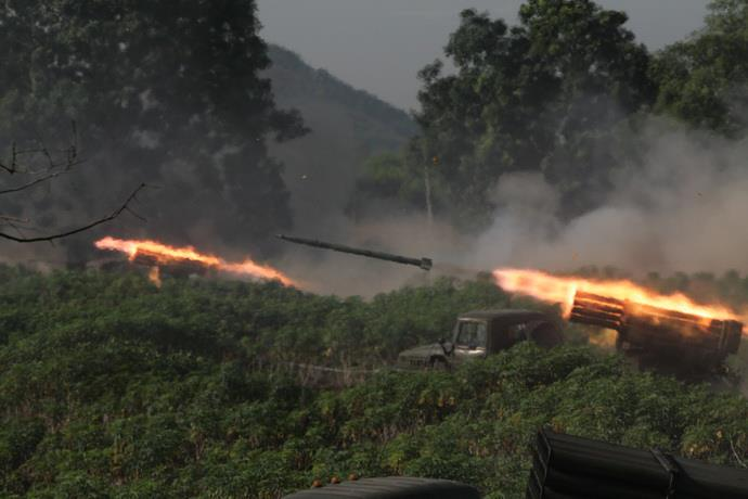 Pháo phản lực phóng loạt BM-21 40 ống 122 mm